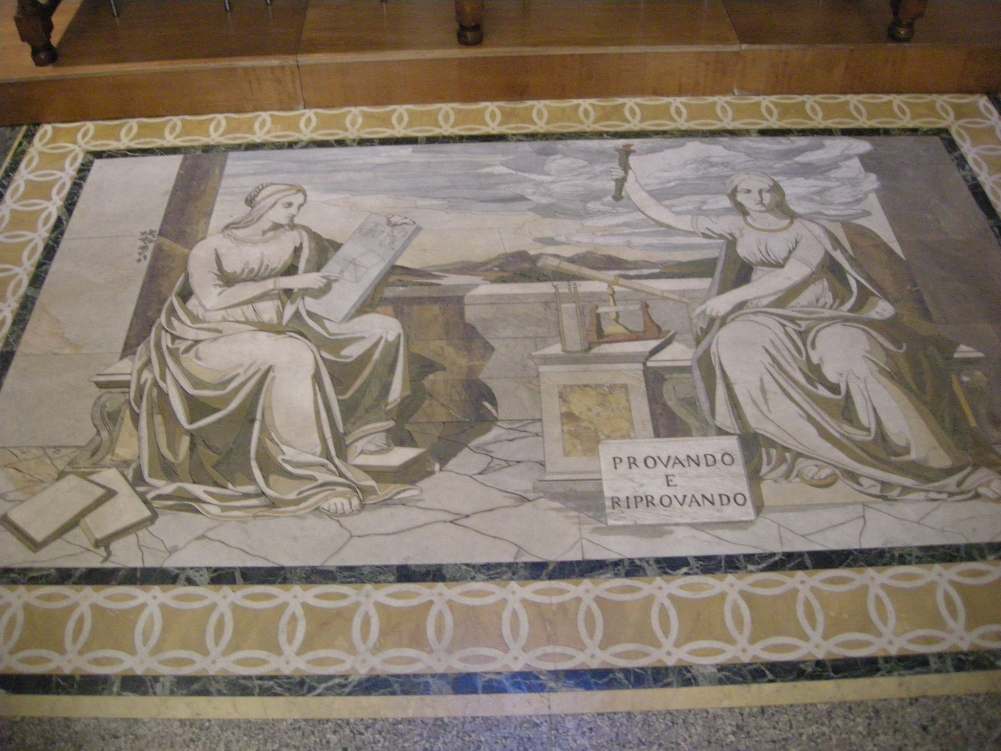 Tribuna di galileo, pavimento con motto accademia del cimento